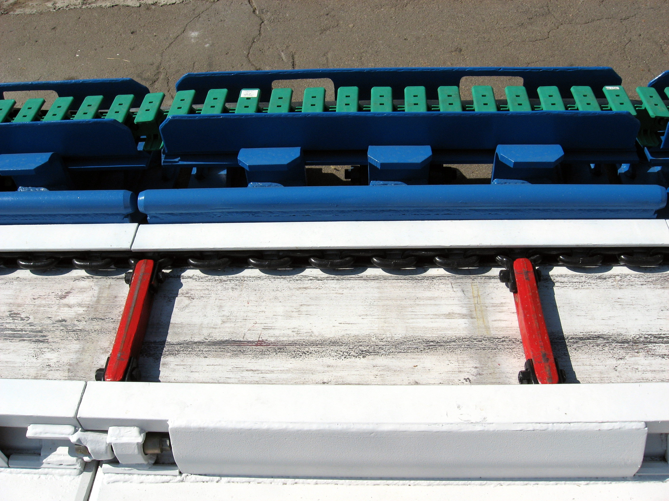 Фото з виставки Вугілля-Майнінг 2008